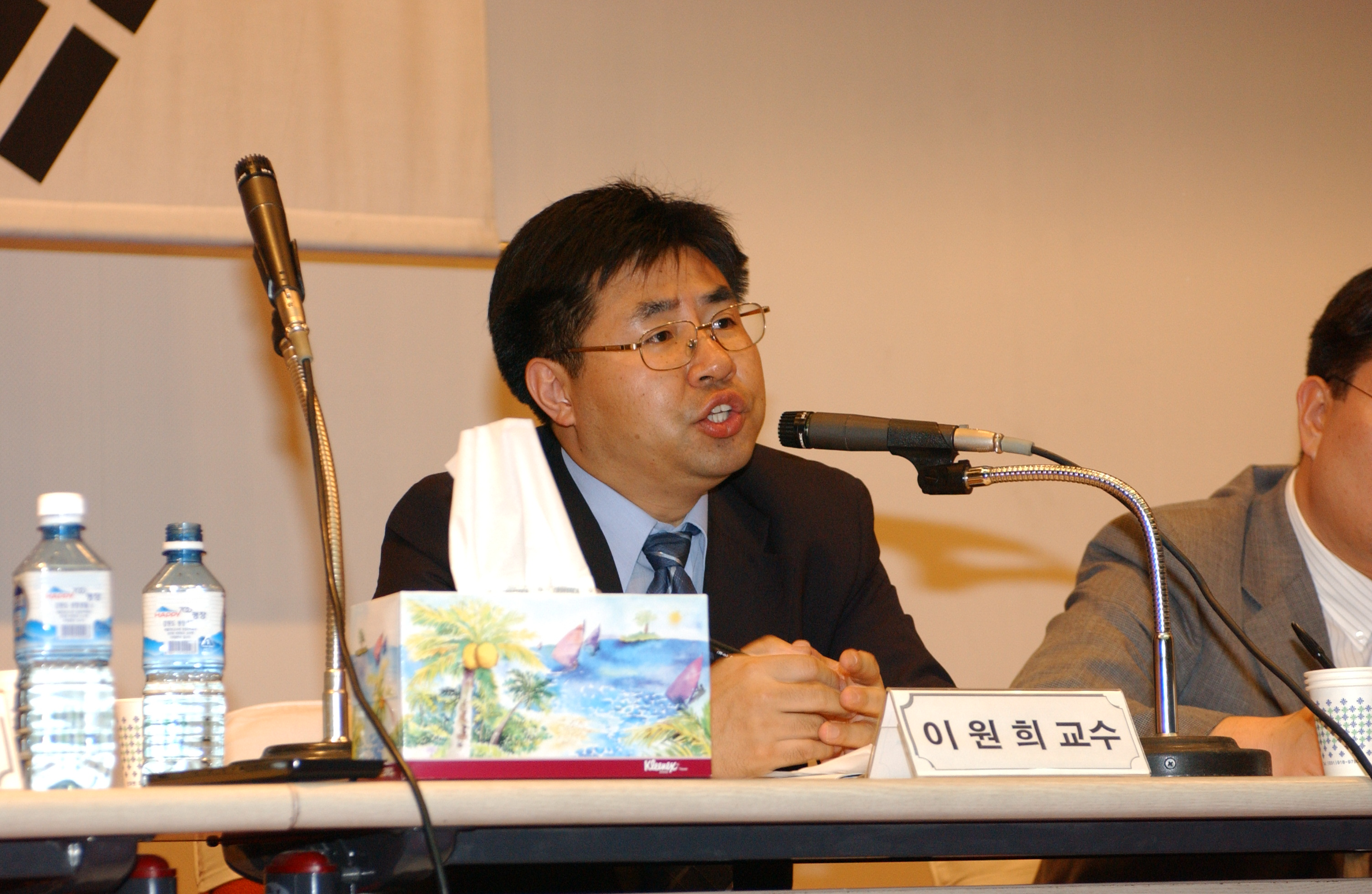 이원희, 2003년 6월 서울특별시 영등포구 사립학교교직원연금관리공단 국회소방방재정책연구회 주관 세미나 '국가 재해관리시스템 어떻게 개편할 것인가'